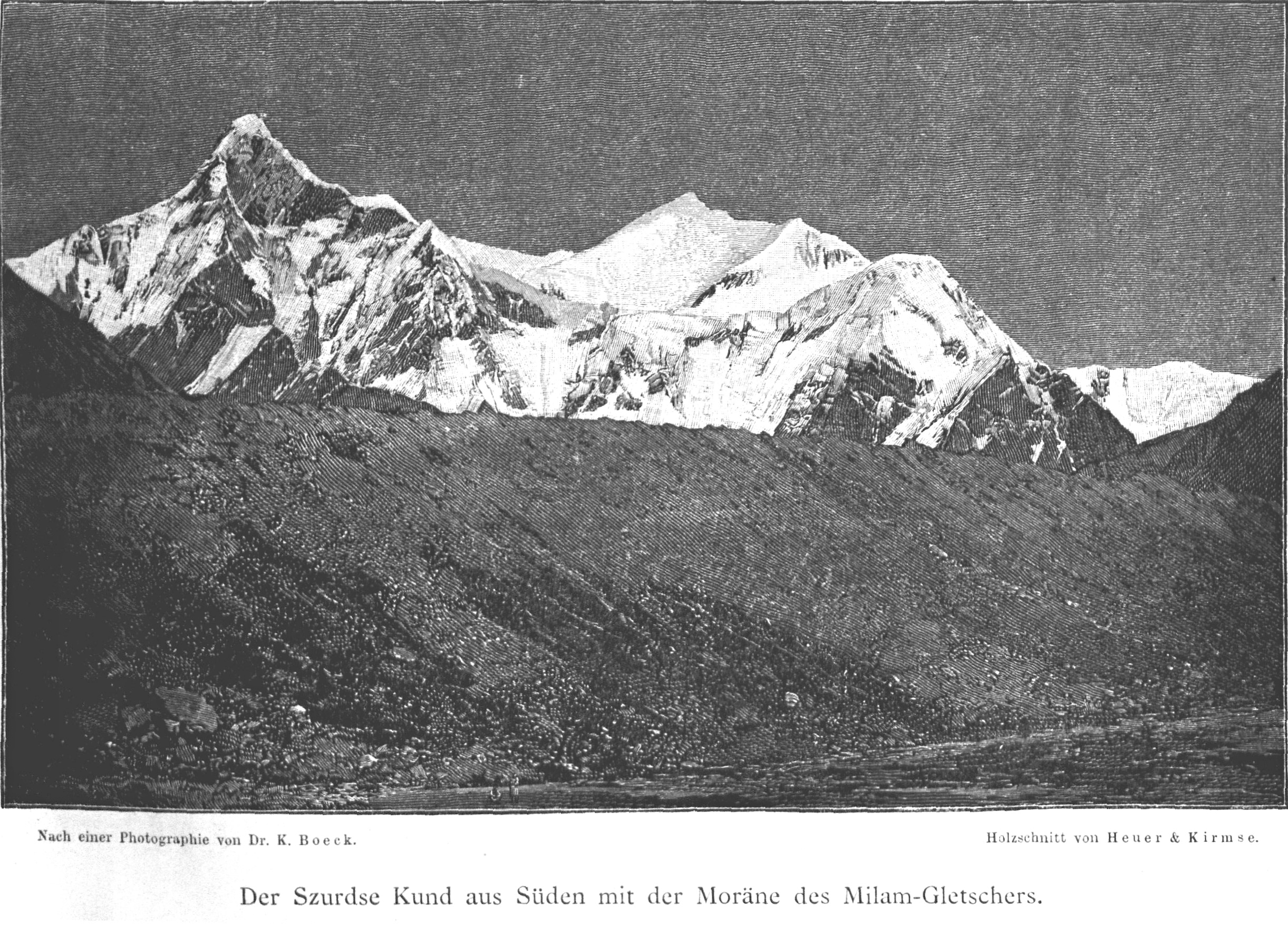 Der Szurdse Kund aus Süden mit der Moräne des Milam Gletschers aus Zeitschrift des Deutschen und Oesterreichischen Alpenvereins 1891 Band 22 (Hardeol 7151 m, Tirsuli I 7075 m)